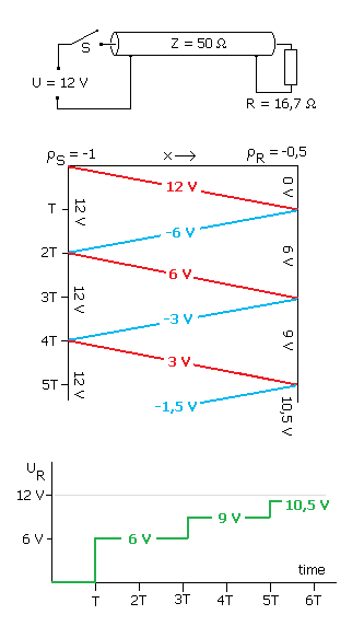 Lattice-Diagram (Impulsfahrplan) der Spannung am Ende einer Koaxleitung mit zu kleinem Lastwiderstand (Reflexionsfaktor = -0,5). Eingespeist wird ein Spannungssprung von 1 V auf 12 V aus einer Quelle mit Innenwiderstand null Ohm. Im mittleren Bild ist der Ort des Sprunges (hor. Achse) als Funktion der Zeit (vertikale Achse) eingezeichnet.